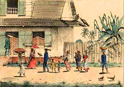 Saint-Laurent au XVIIIe s